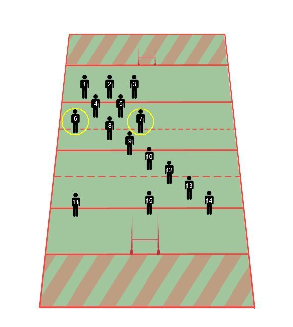 Rugby 15. Posiciones.Alas o flankers.